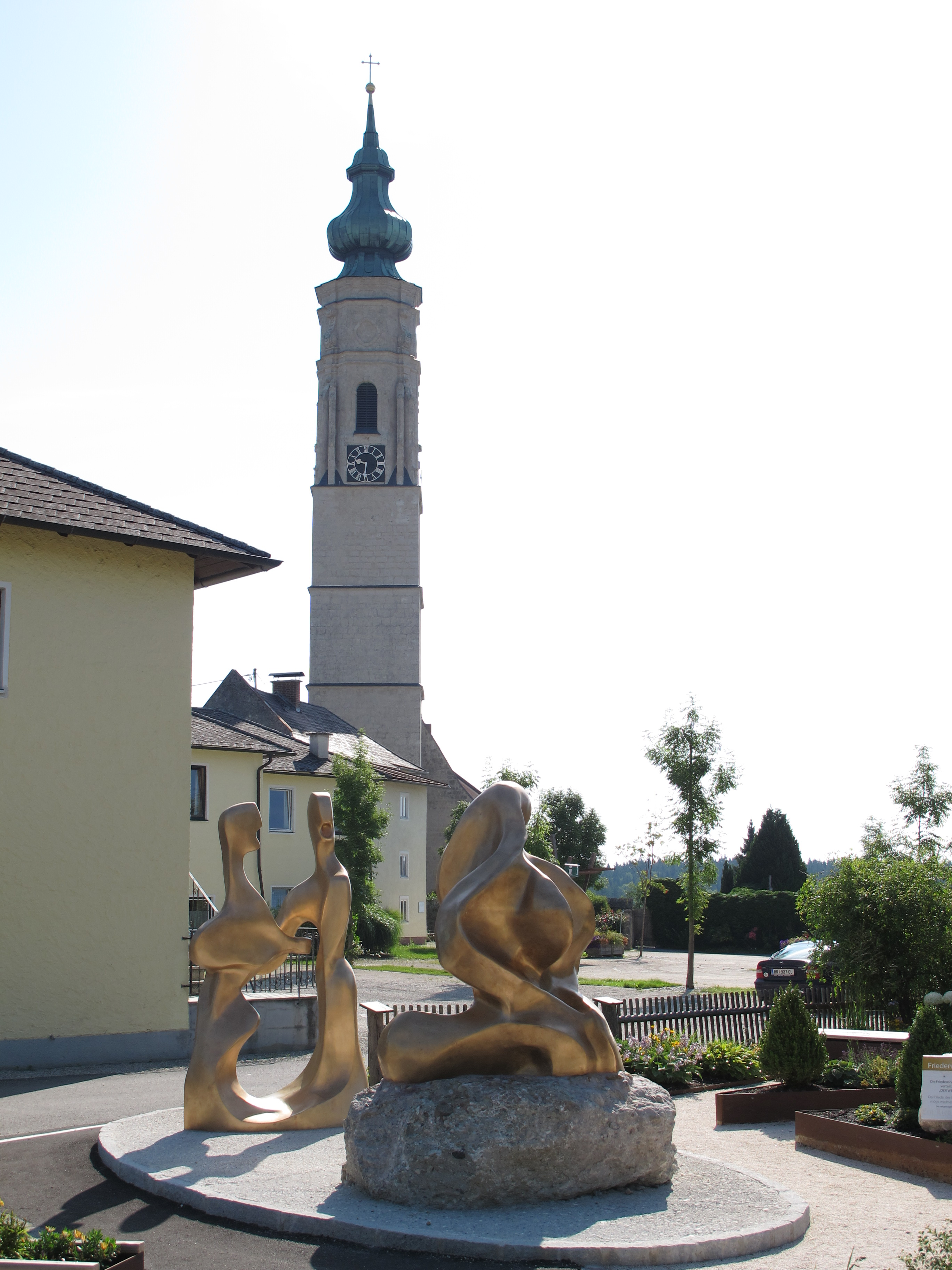 Kirche Hochburg